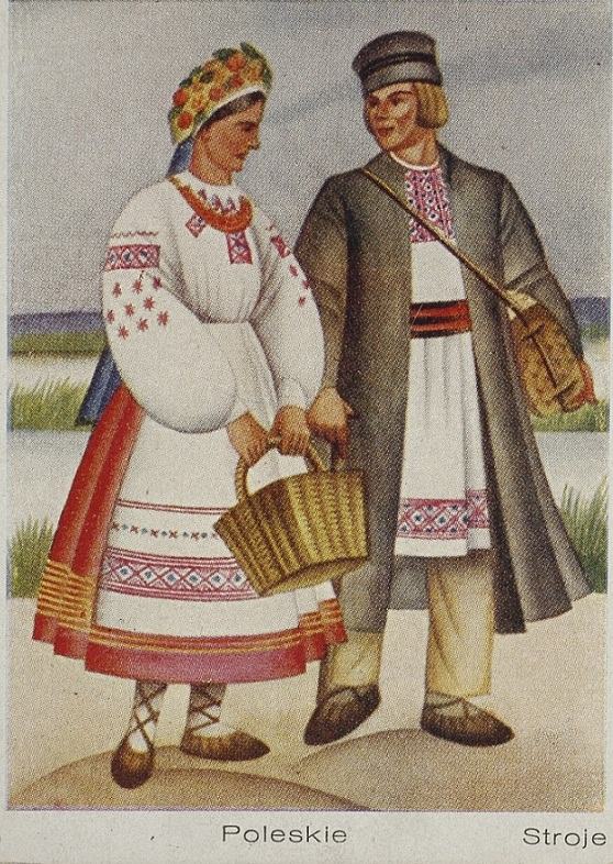 Poleszuk.